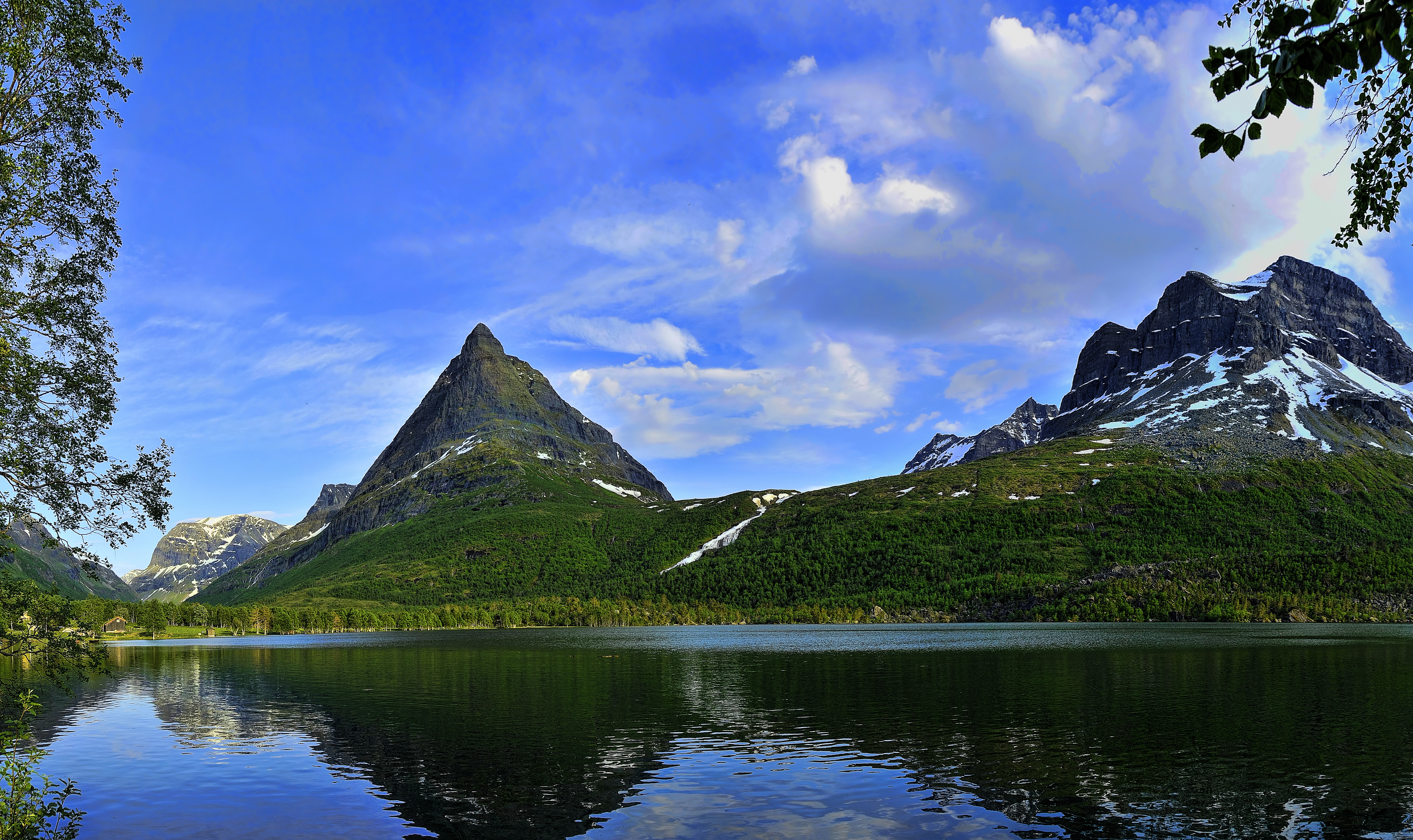 Innerdalstårnet.